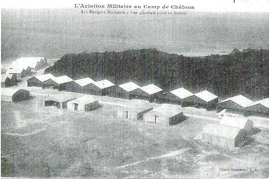 L'Aviation Militaire au Camp de Châlons. Les Hangars Militaires - Vue générale prise en Ballon, commune de Bouy, Marne, France.